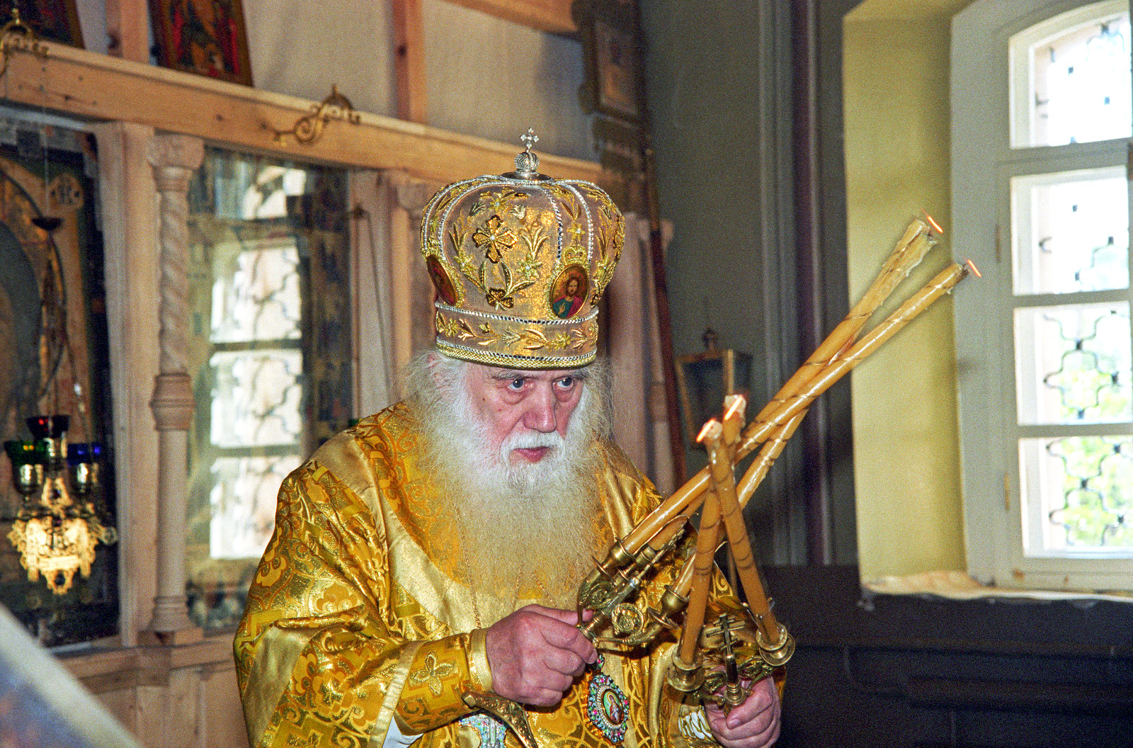 Архиепископ Михей (Хархаров) осеняет прихожан с амвона, в его руках дикирий и трикирий. Идёт литургия. Благовещенская церковь, Никольский монастырь, Переславль-Залесский